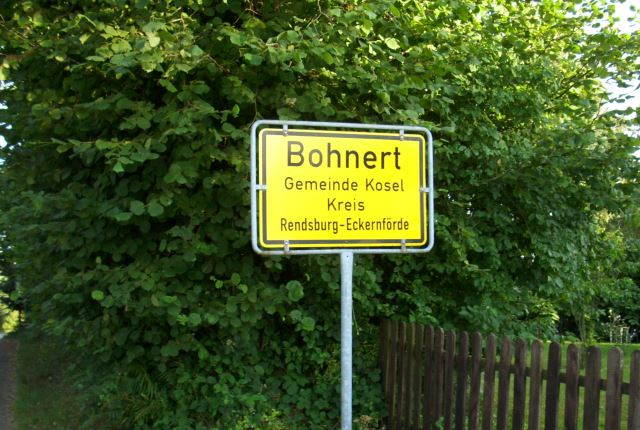 Interlingua: Bohnert / Bonert